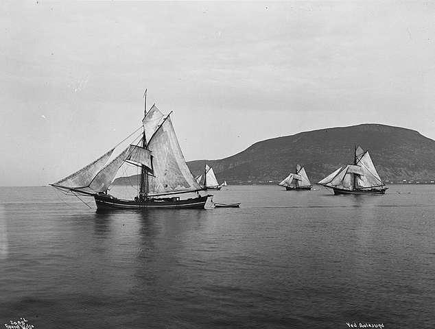 Hardangerjakter på Vigrafjorden ved Ålesund.